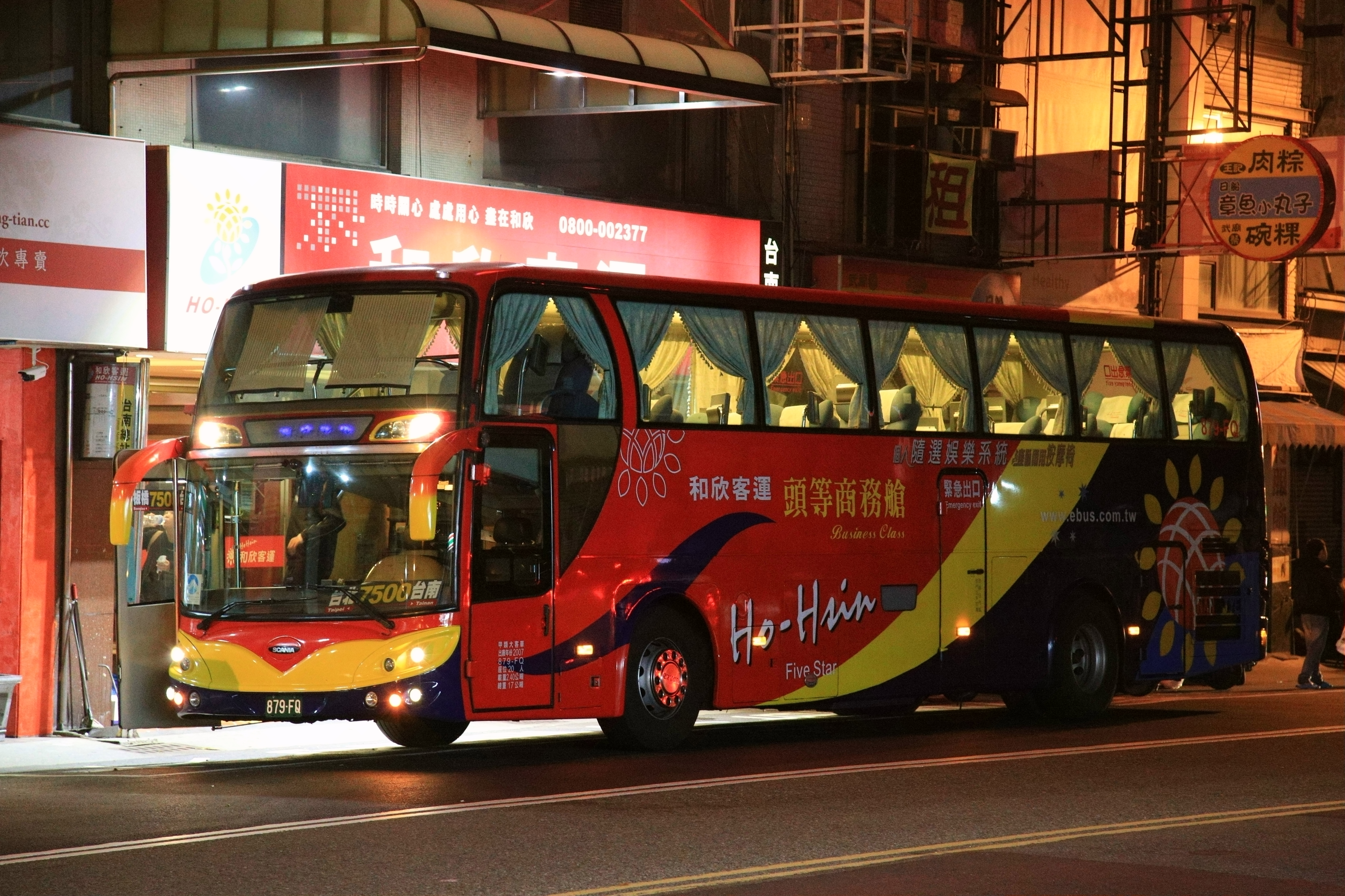 和欣客運SCANIA K380EB4X2LI大客車879-FQ，停靠和欣客運台南總站。